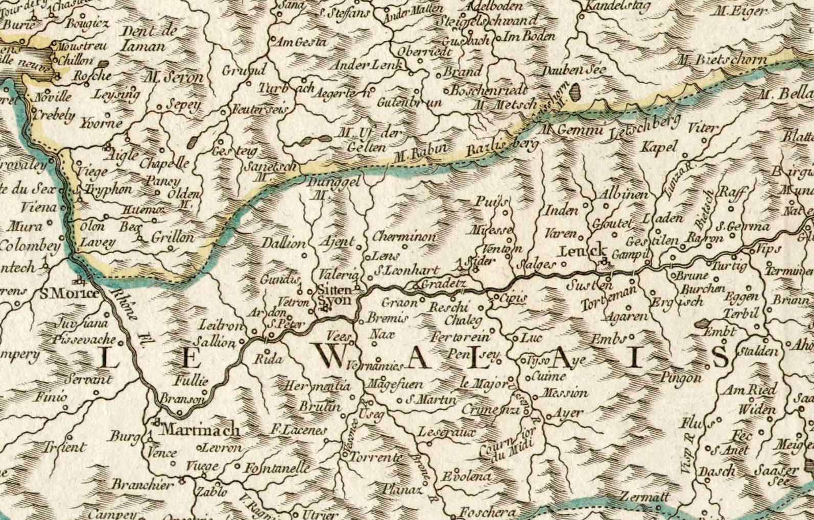 Carte du Valais de 1756, Nax y est situé en dessous de Sion (Sitten).